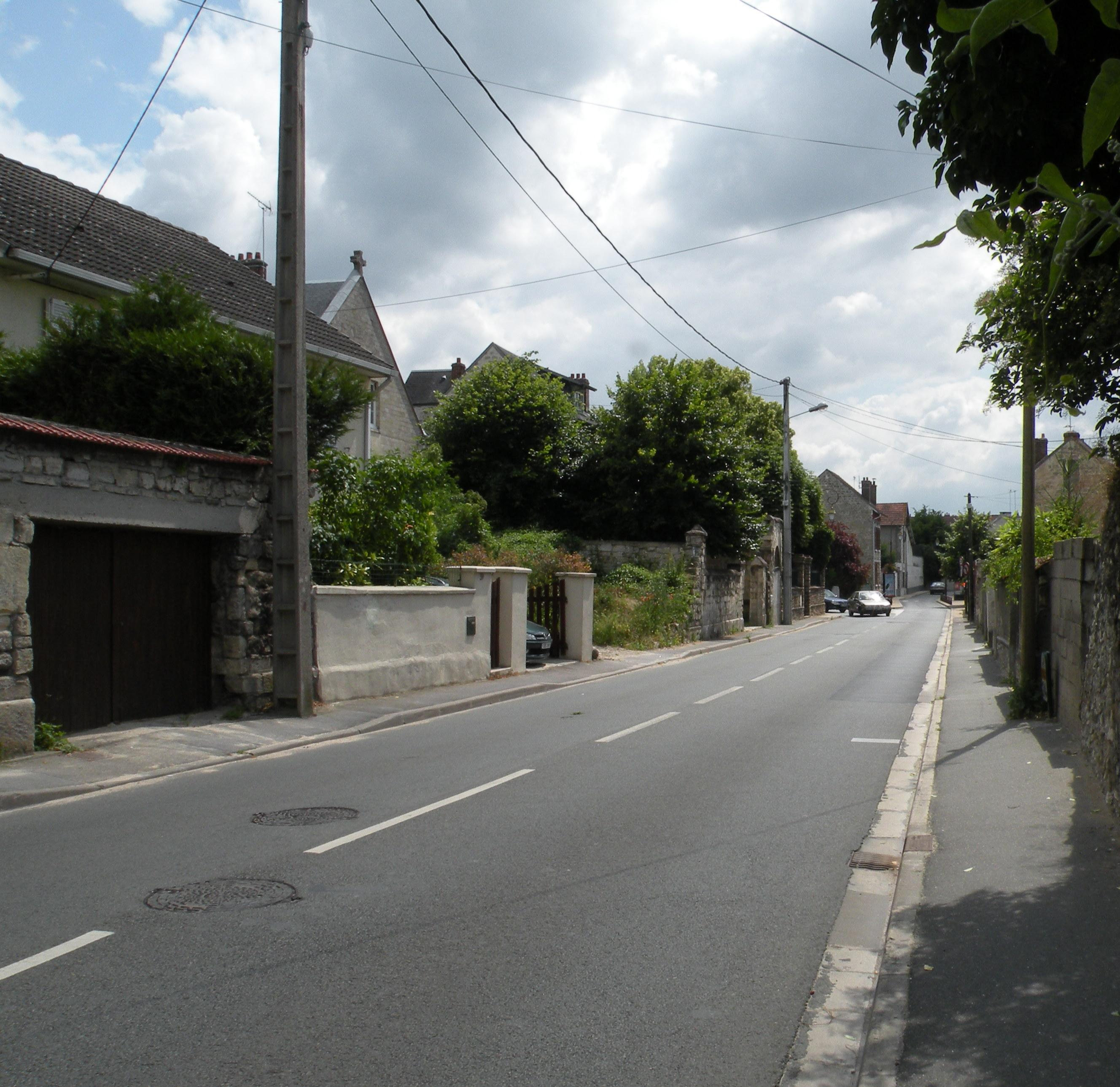 rue de Mériel, val d'oise france